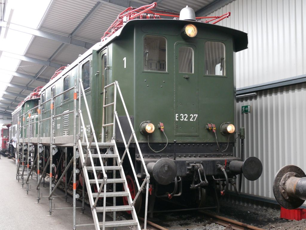 Bayerische EP 2